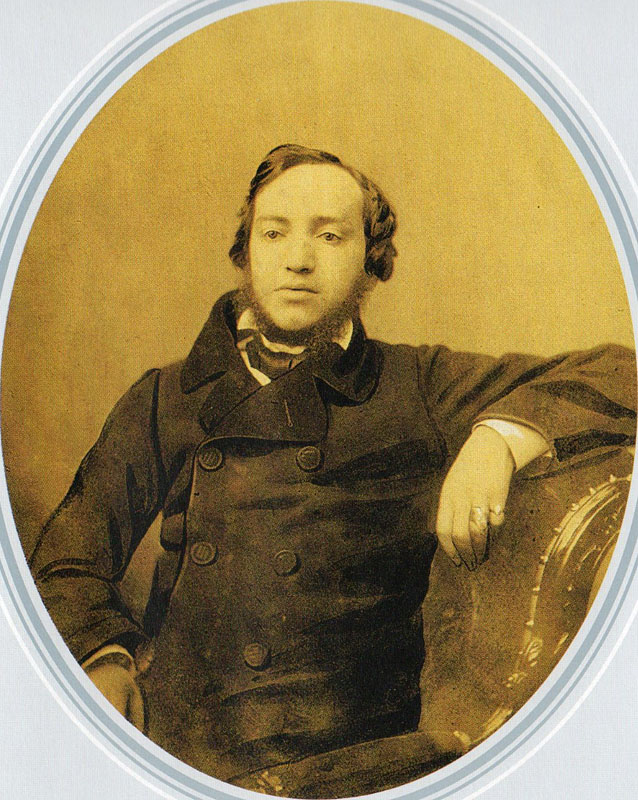 Граф Григорий Александрович Кушелев-Безбородко (1832—1870), статский советник